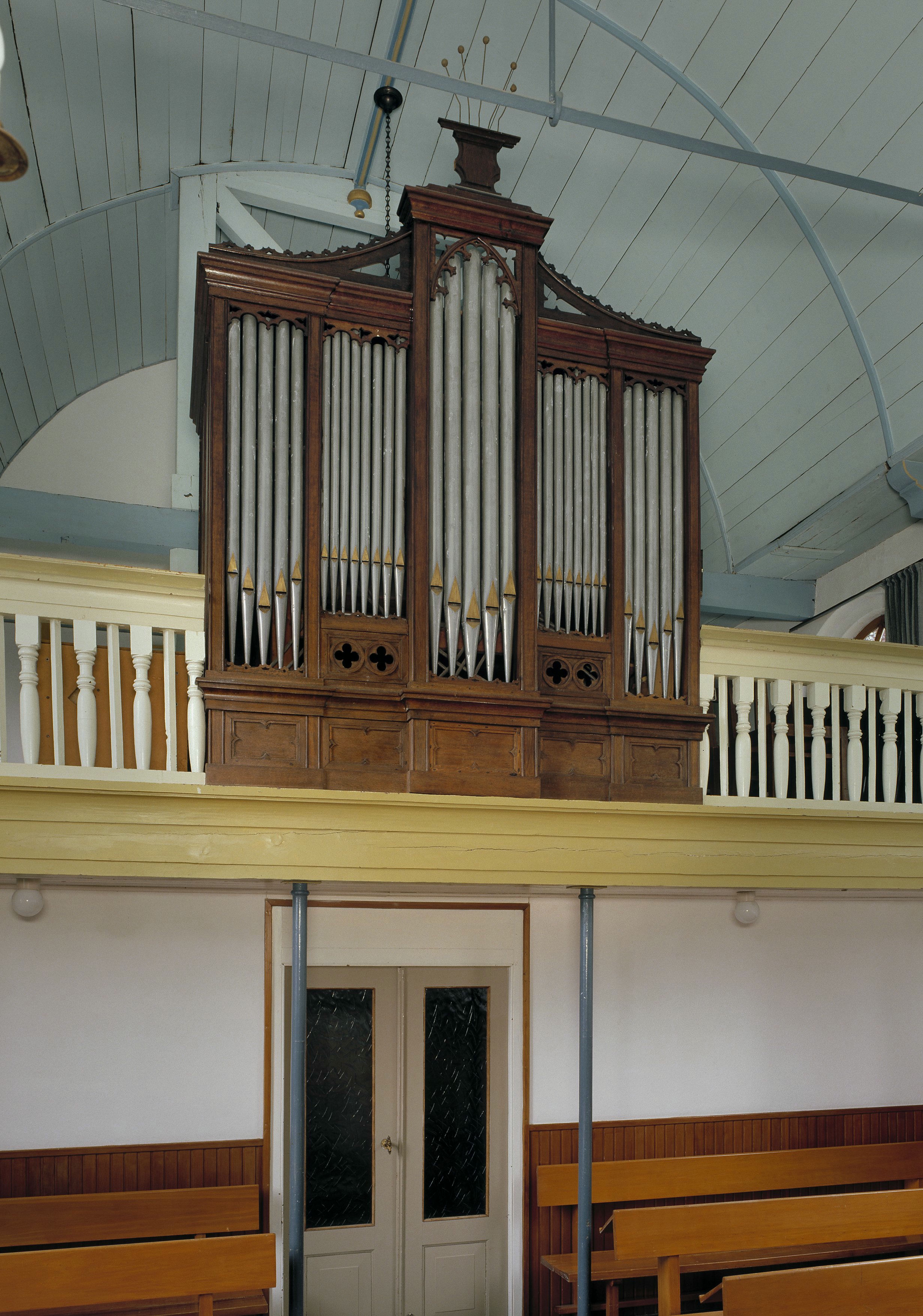 Nederlands Hervormde Kerk: Interieur, aanzicht orgel, orgelnummer 1301 (opmerking: Gefotografeerd voor Het Historische Orgel in Nederland 1865-1872, bladzijde 40)